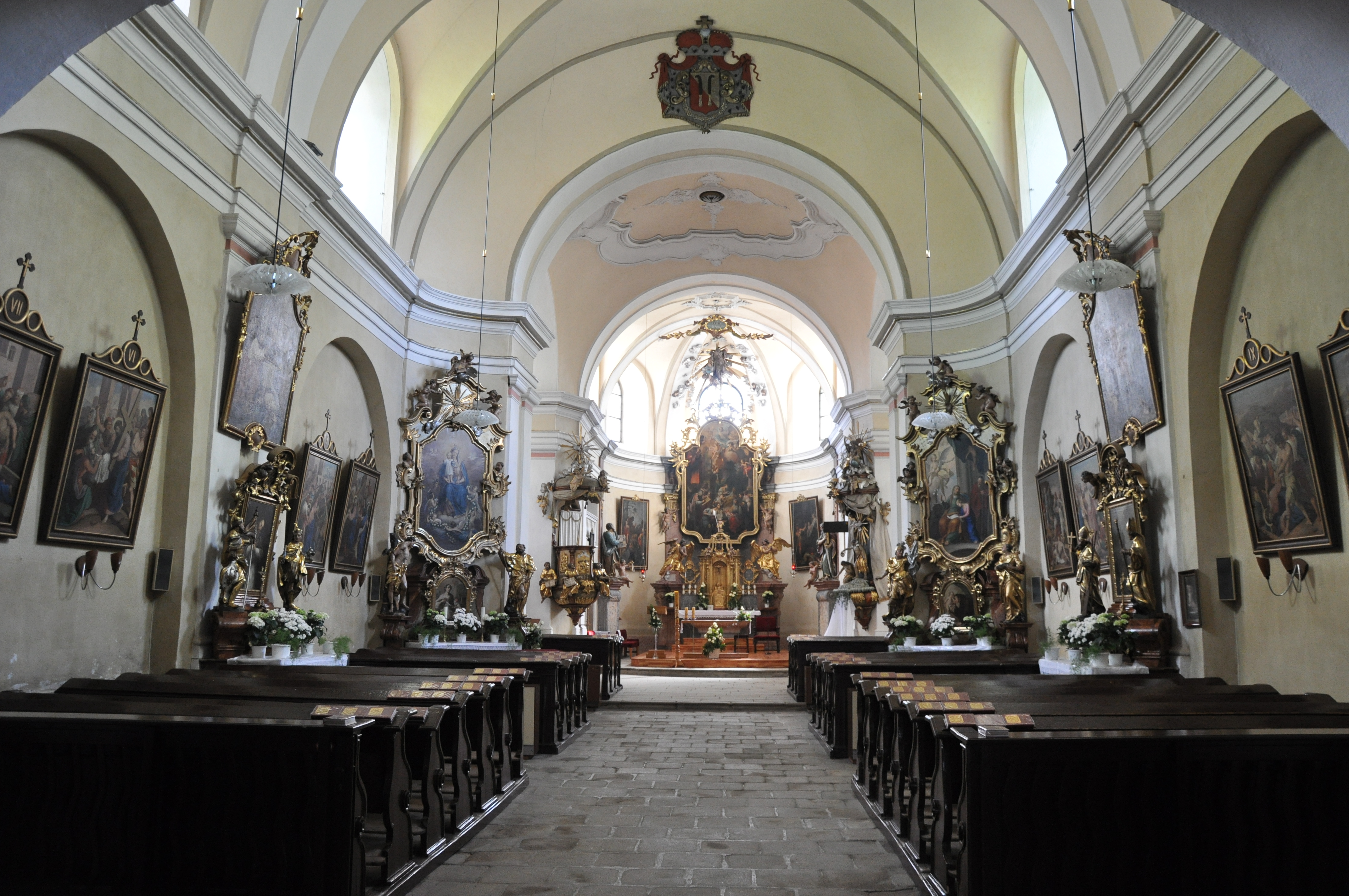 Interier kostela. V roce 1891 restauroval interiér kostela A. Sucharda.Kostel Narození svatého Jana Křtitele, jehož dnešní barokní podoba pochází z roku 1750, se nachází v centru Přibyslavi. Svatostánek na jeho místě ale stával podstatně dříve, už kolem roku 1265. Město Přibyslav. Okr.Havlíčkův Brod. Kraj Vysočina.